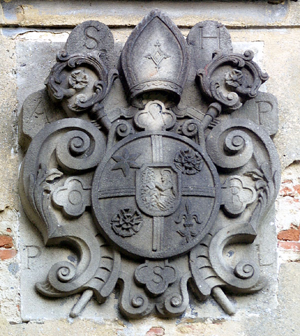 Kamenný znak plaského kláštera s osobním štítkem opata Silvestera Hetzera na věži kostela Nanebevzetí Panny Marie v Plané nad Mží.